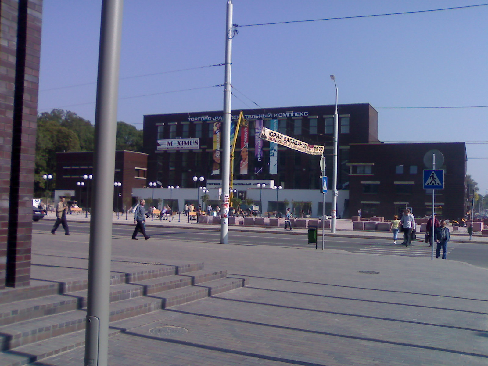 Haus der Technik (1924-1925) Бывший Дом техники Восточной немецкой ярмарки архитектора Ханса Хоппа (H.Hopp) постройки 1925 года, ныне Эпицентр - торговые и развлекательные заведения в Калининграде-Кёнигсберге.